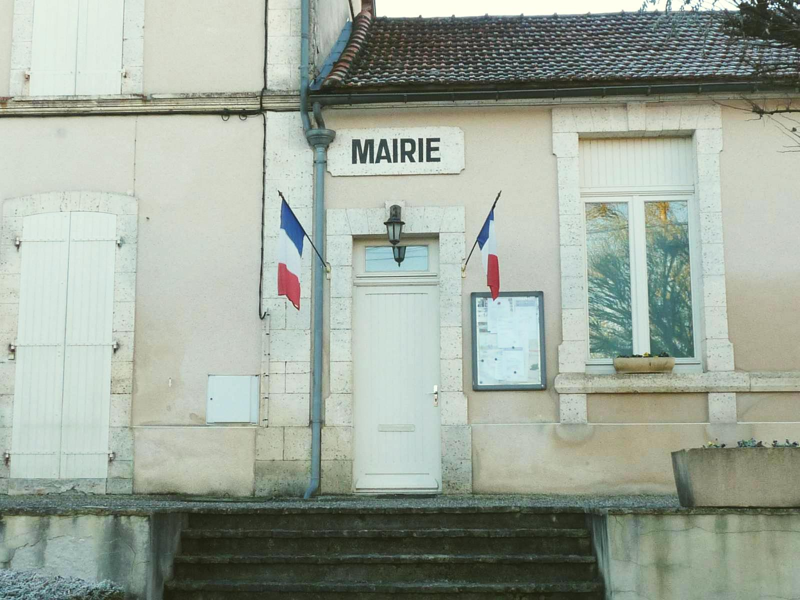 mairie de Mouton, Charente, France